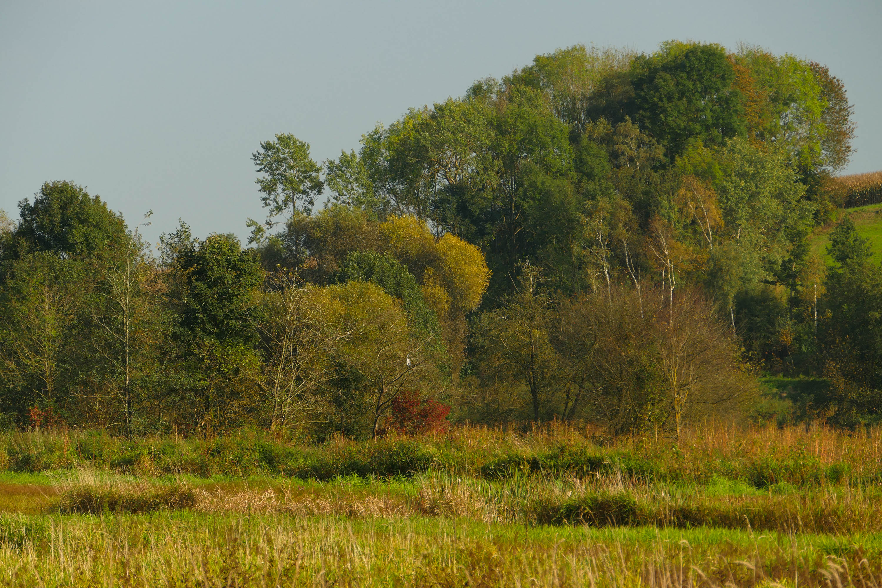 Koaserin This media shows the nature reserve in Upper Austria with the ID n121.